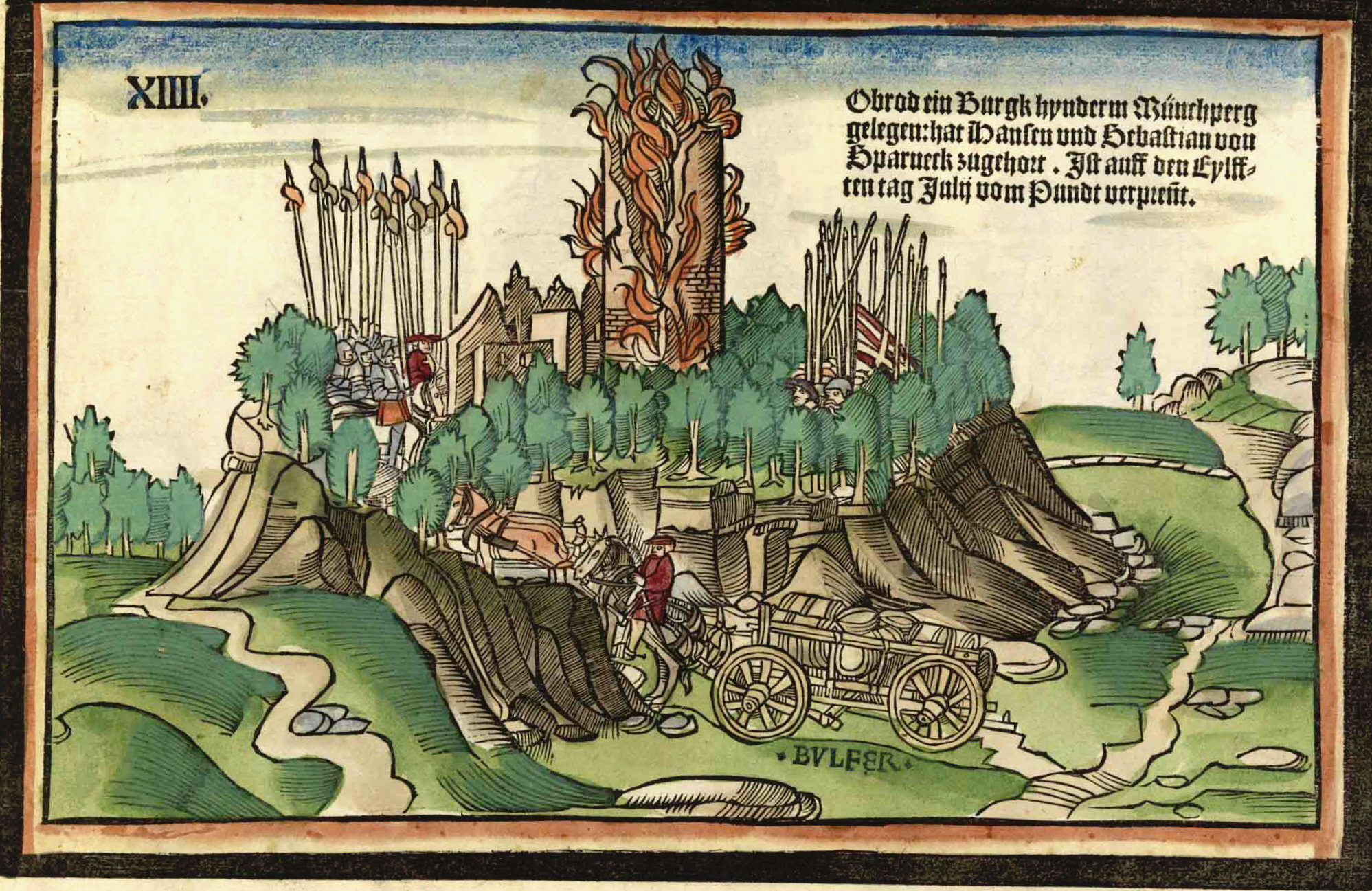 Holzschnitt von Hans Wandereisen.1523